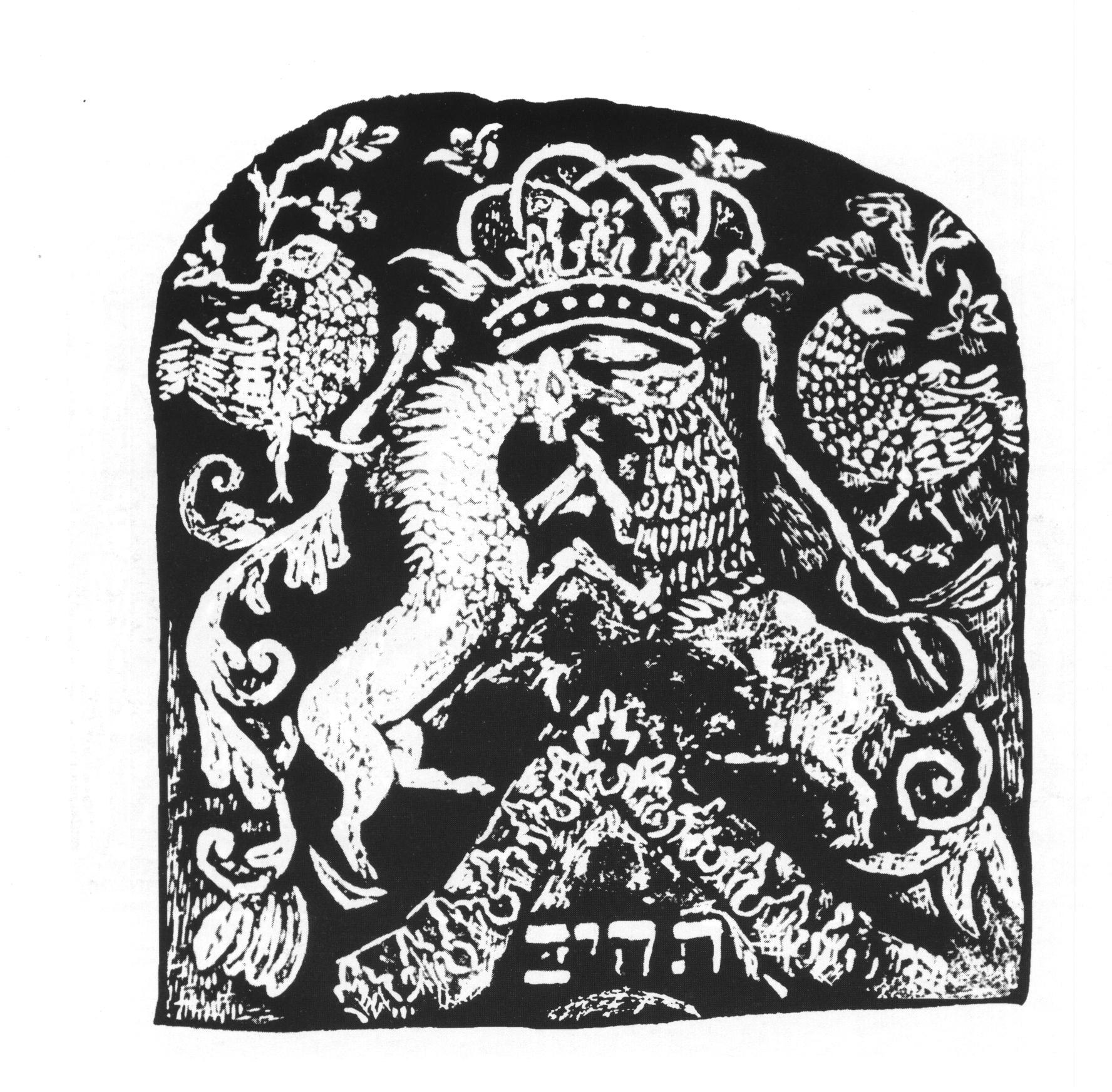 עיטור